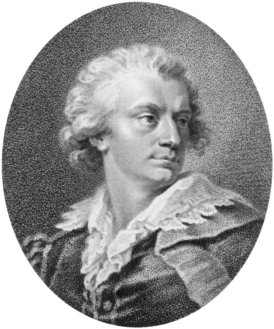 Lars von Engeström (1751 - 1826) swedish minister and diplomat